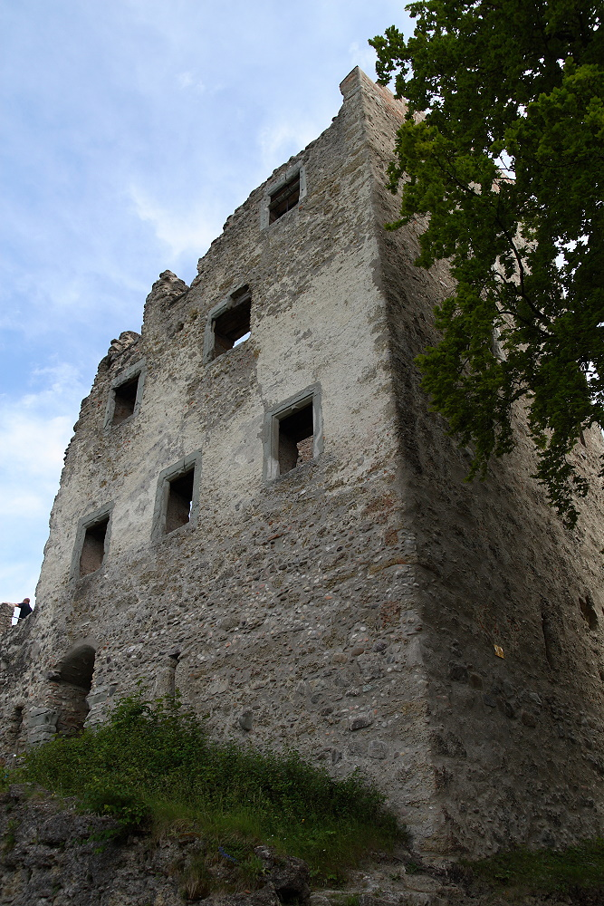 Ruine Bodman, Palasreste, Blick von Norden.